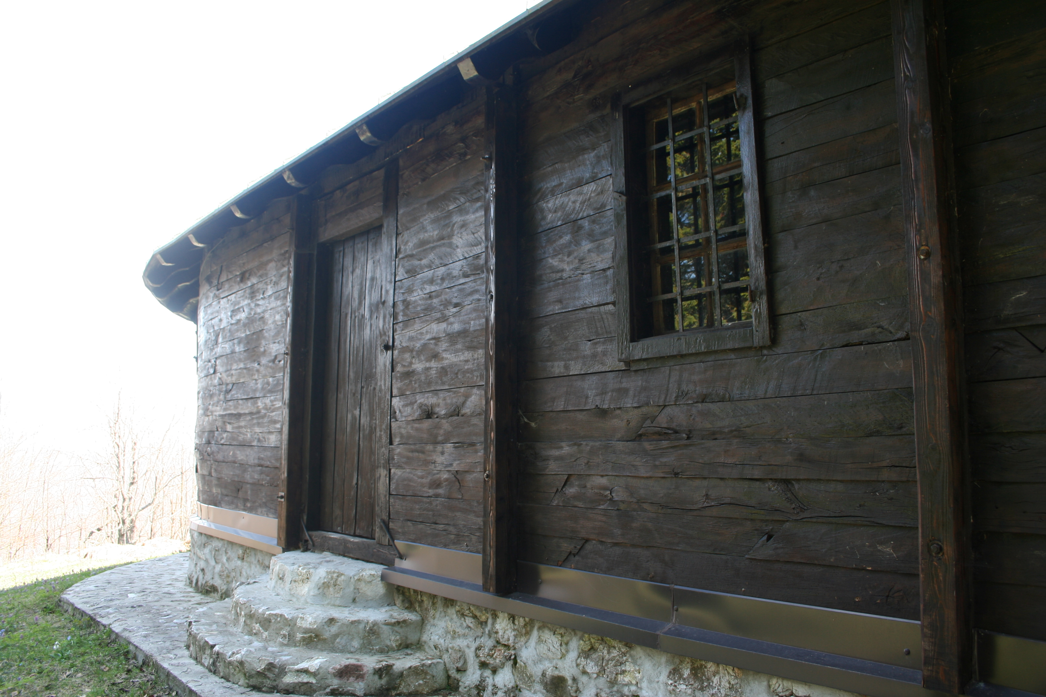 Crkva brvnara na Bobiji